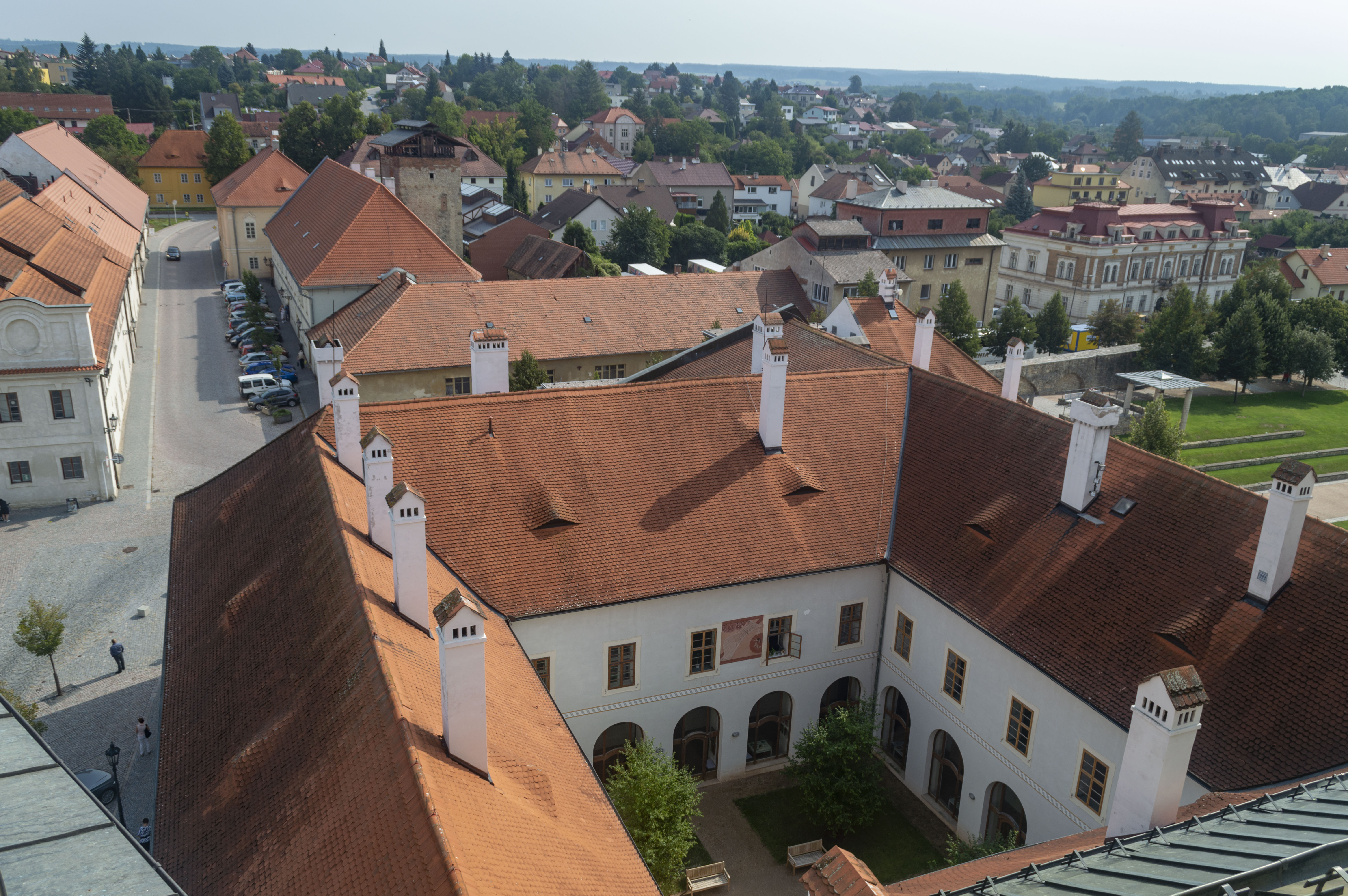 Pohled na piaristický klášter v Litomyšli ze střechy kostela